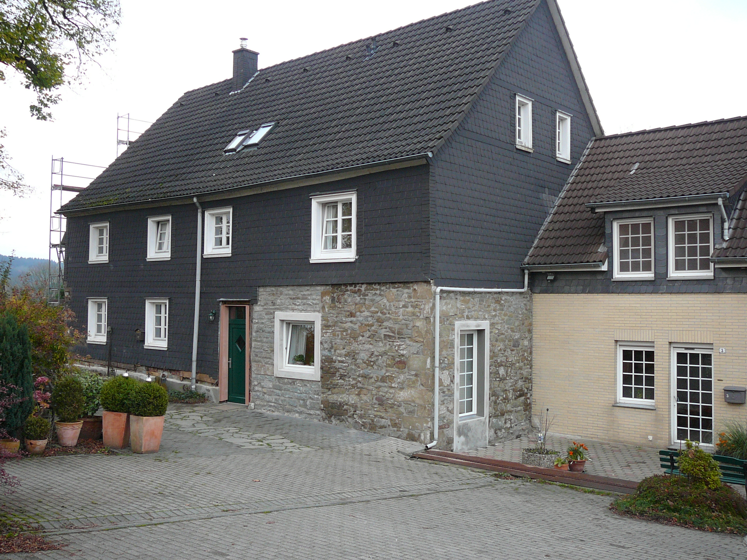 Hofgut Steinhaus, Wuppertal